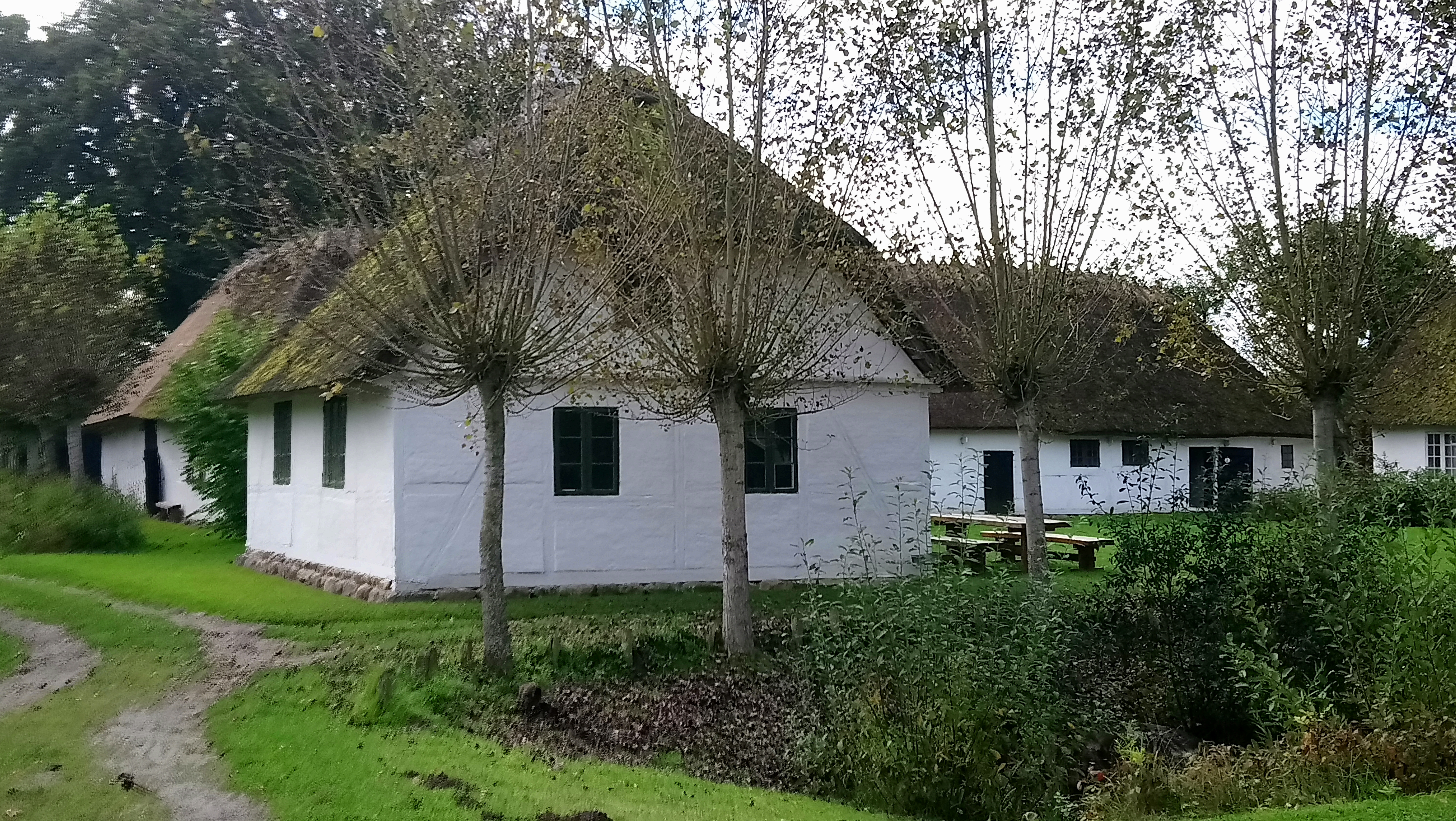 Opført i 1872. Købt af museet i 2003 og opført på museet i 2006.